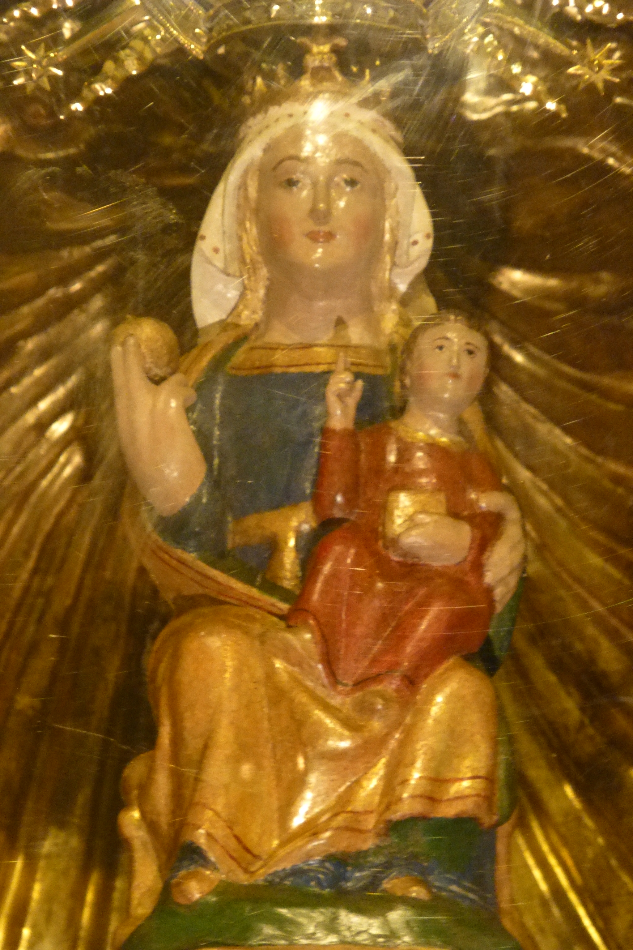 Virgen de Arrate en Eibar Gipuzkoa (País Vasco, España)